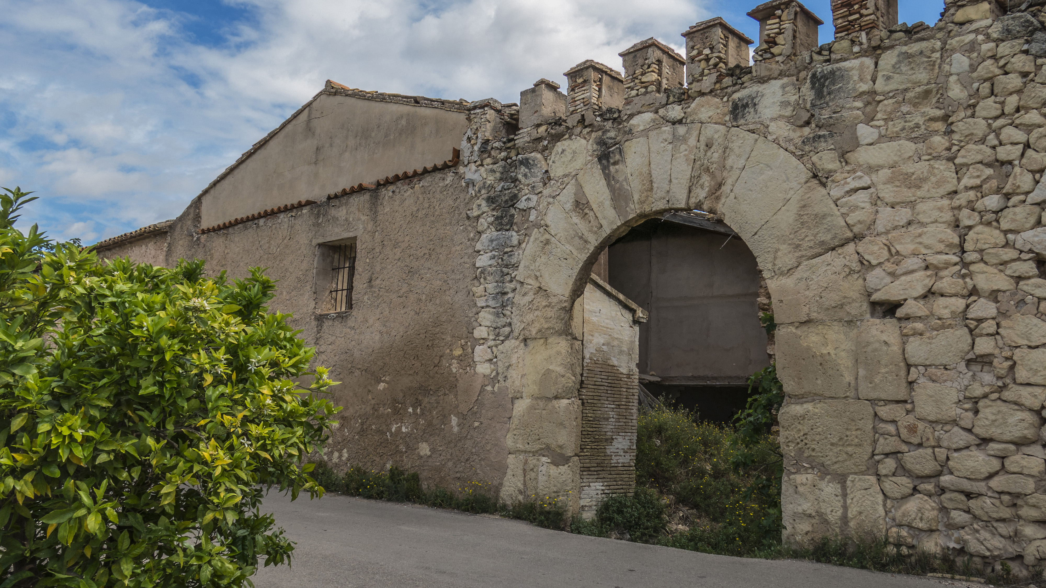 El Recinte emmurallat de Berfull, es troba al municipi de Rafelguaraf, a la comarca de la Ribera Alta del País Valencià. Està catalogat com a Bé d'interès cultural, amb número d'anotació ministerial: RI-51-0010807, i data d'anotació 17 de juny de 2002.